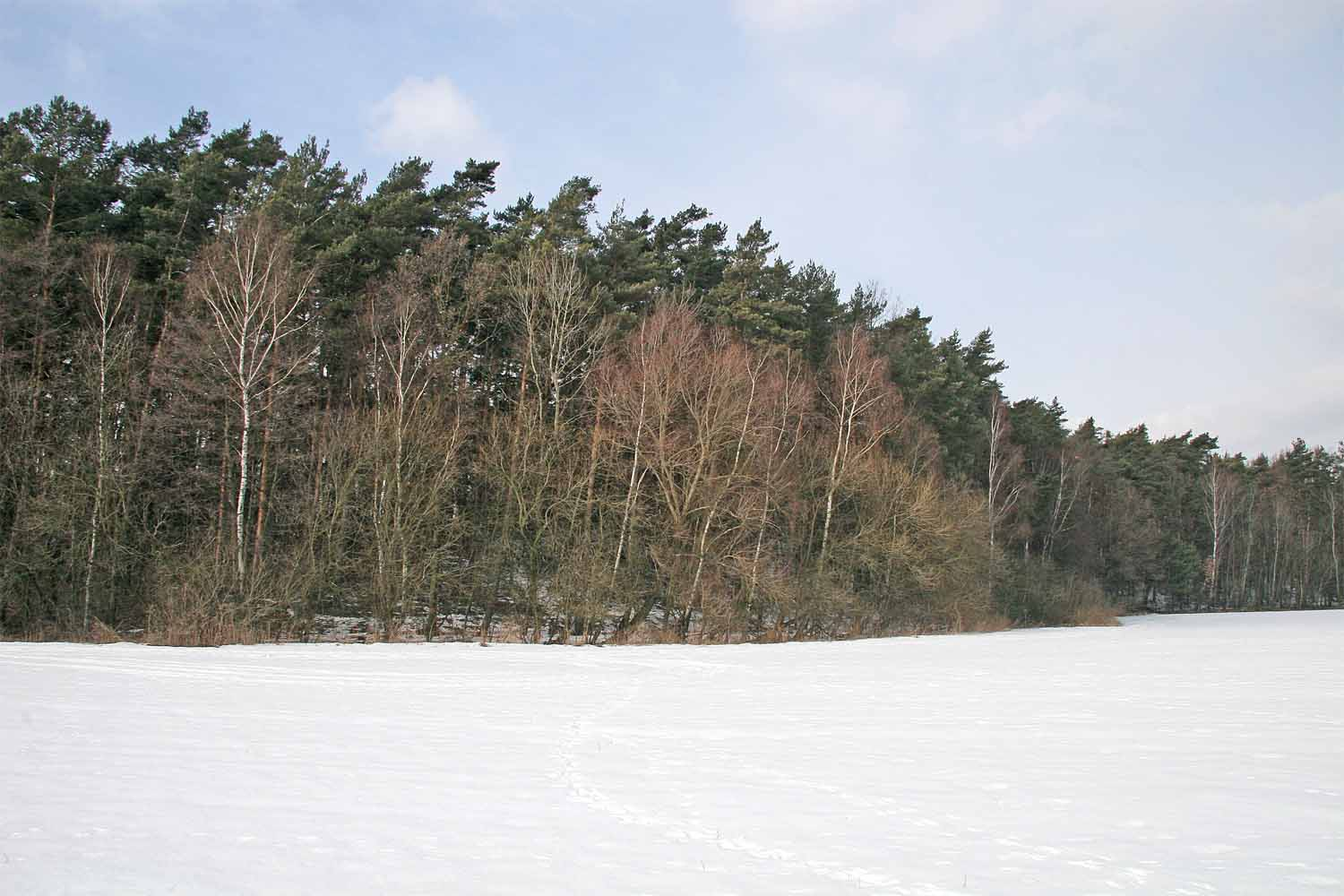 Přírodní rezervace Přesypy u Rokytna autor:Zp